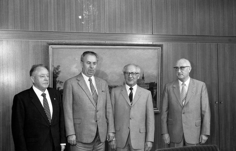 Berlin, Erich Honecker empfängt Jaromir Obzina ADN-ZB/Mittelstädt 2.6.83 Berlin: CSSR-Innenminister empfangen. Erich Honecker, Generalsekretär des ZK der SED und Vorsitzender des Staatsrates der DDR, empfing Jaromír Obzina , Minister des Innern der CSSR. V.r.n.l.: Friedrich Dieckel, Erich Honecker, Dr. Jaromir Obzina und Erich Mielke Abgebildete Personen: Mielke, Erich: Minister für Staatssicherheit, Armeegeneral, Politbüro des Zentralkomitees (ZK) der SED, DDR (GND 118977490) Honecker, Erich: Staatsratsvorsitzender, Generalsekretär des ZK der SED, DDR (GND 118553399) Obzina, Jaromir Dr.: Innenminister, CSSR Dickel, Friedrich: Innenminister, Chef der Volkspolizei, ZK der SED, DDR (GND 107435829)